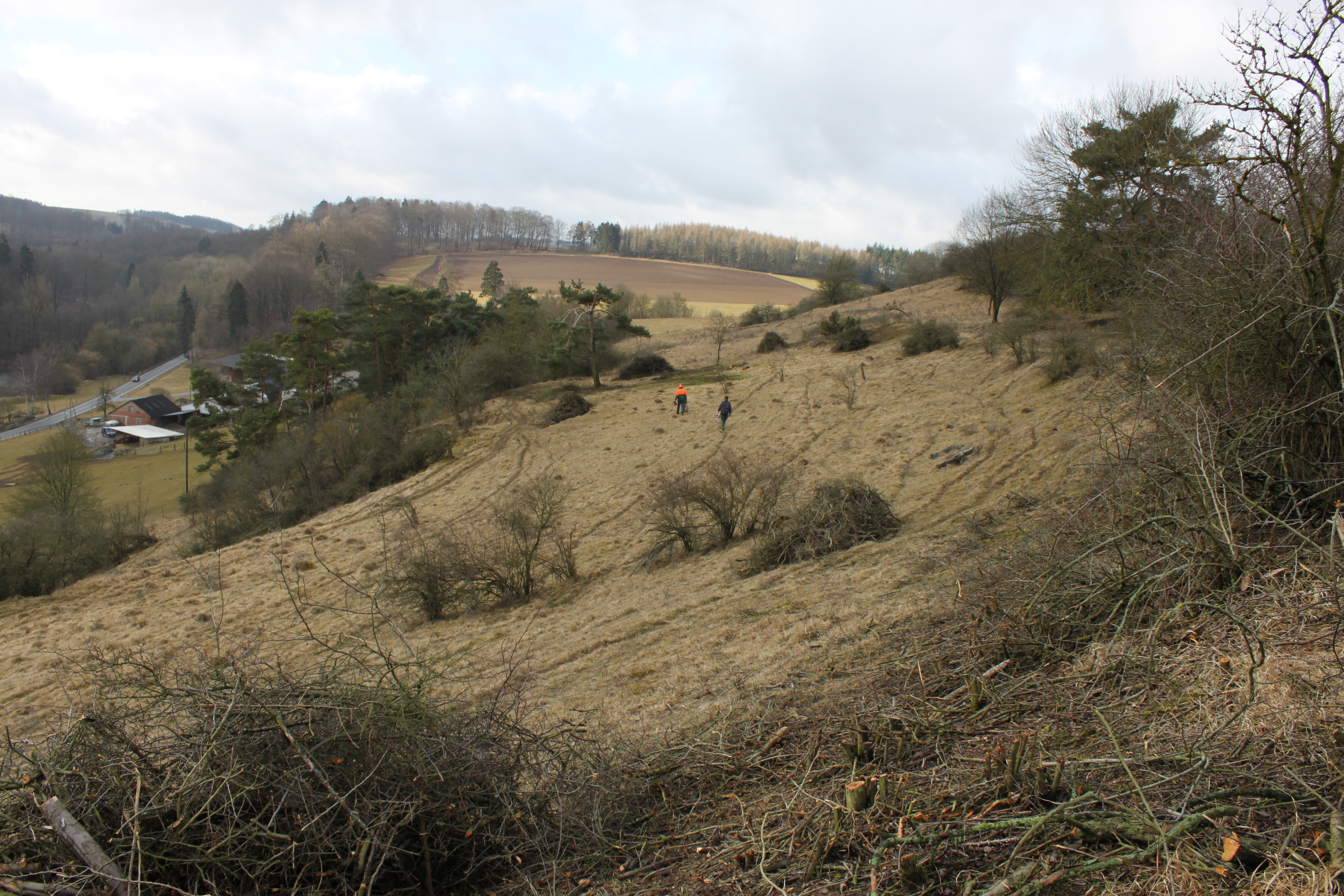 Naturschutzgebiet Udorfer Mühle während Entbuschungsmaßnahme der Biologischen Station Hochsauerlandkreis. Udorfer Mühle links hinten.